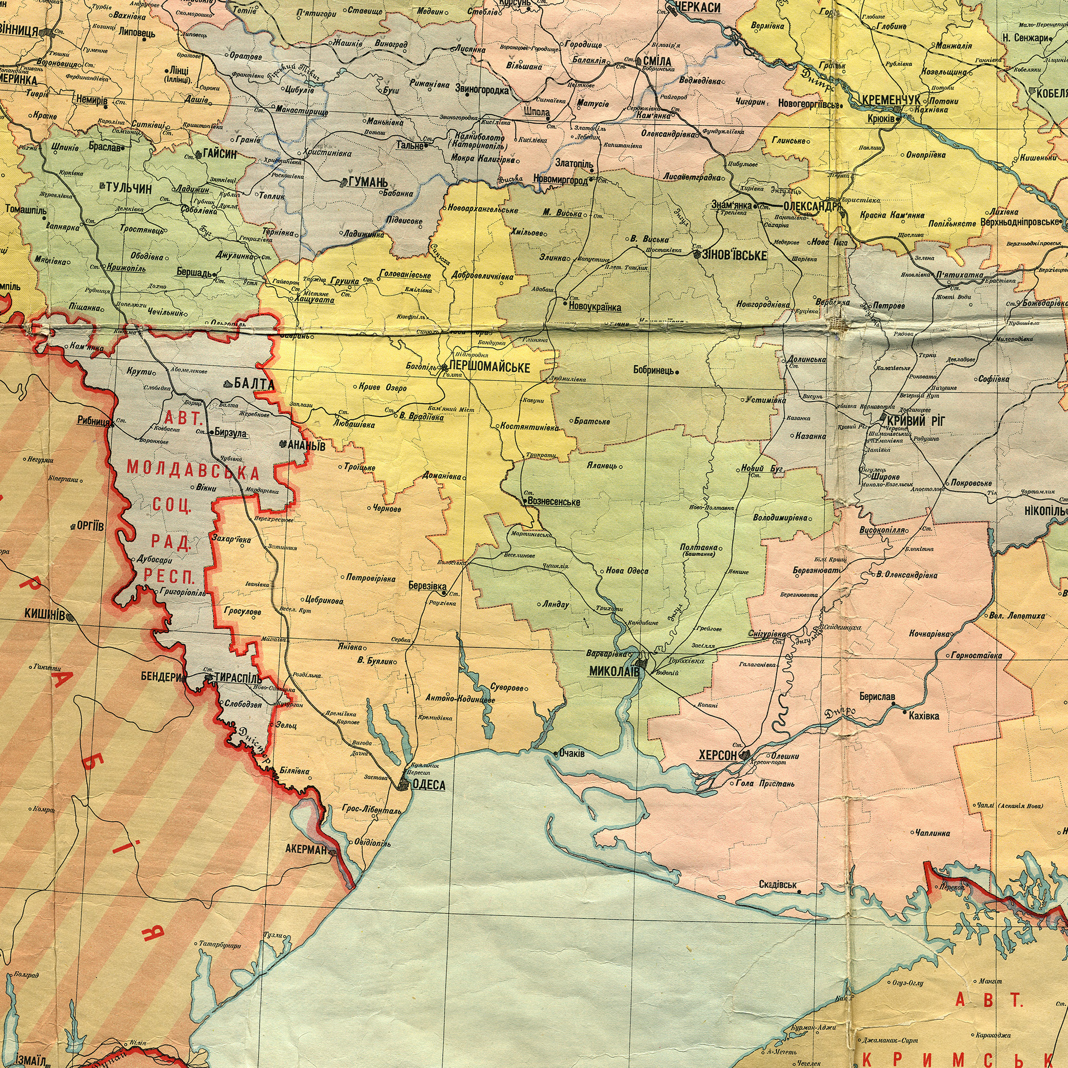 Територія колишньої Одеської губернії, фрагмент мапи Української соц. рад. республіки, адміністративний поділ від 1 березня 1927